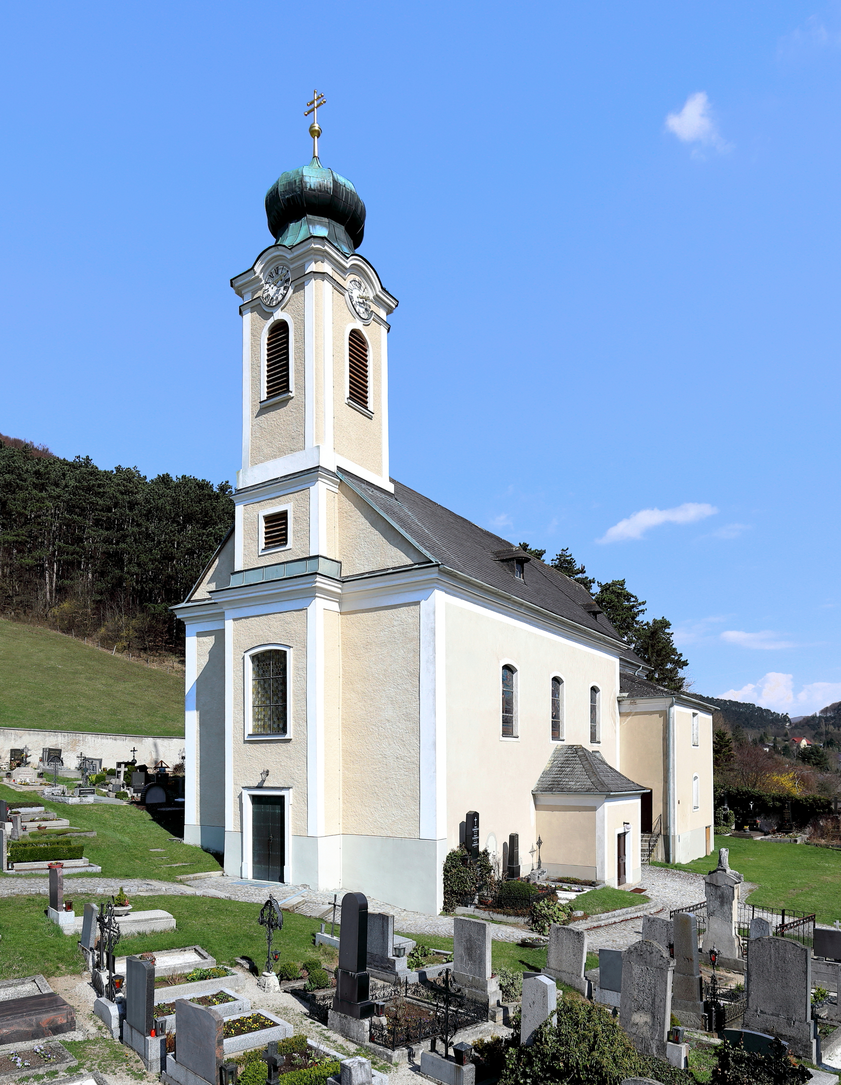 Die röm.-kath. Pfarrkirche hl. Johannes der Täufer in der niederösterreichischen Marktgemeinde Altenmarkt an der Triesting. Eine barocke Saalkirche (1783/86) in erhöhter Lage mit einem spätgotischen Chor.